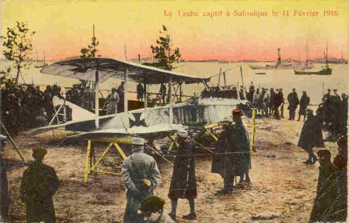 Avion allemand capturé par les Alliés et exposé près de la Tour Blanche, Thessalonique, 1916. Contrairement à ce qu'indique la légende de la carte postale, il ne s'agit pas d'un Taube mais d'un Albatros C.I, avion biplace de reconnaissance.